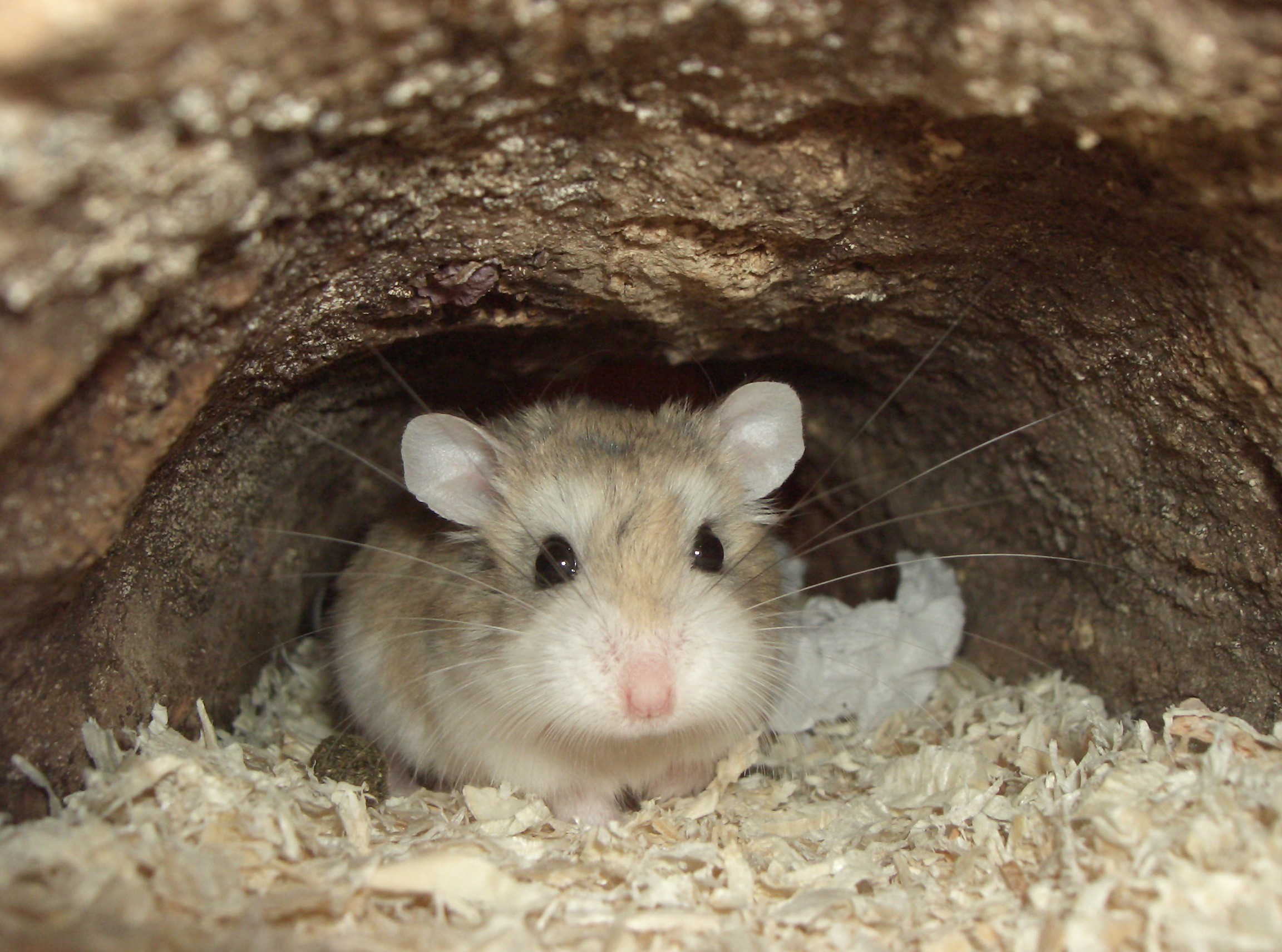 Phodopus roborovskii, male, 18 months old